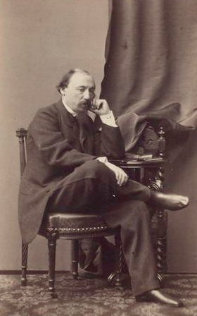 Некрасов, Николай Алексеевич